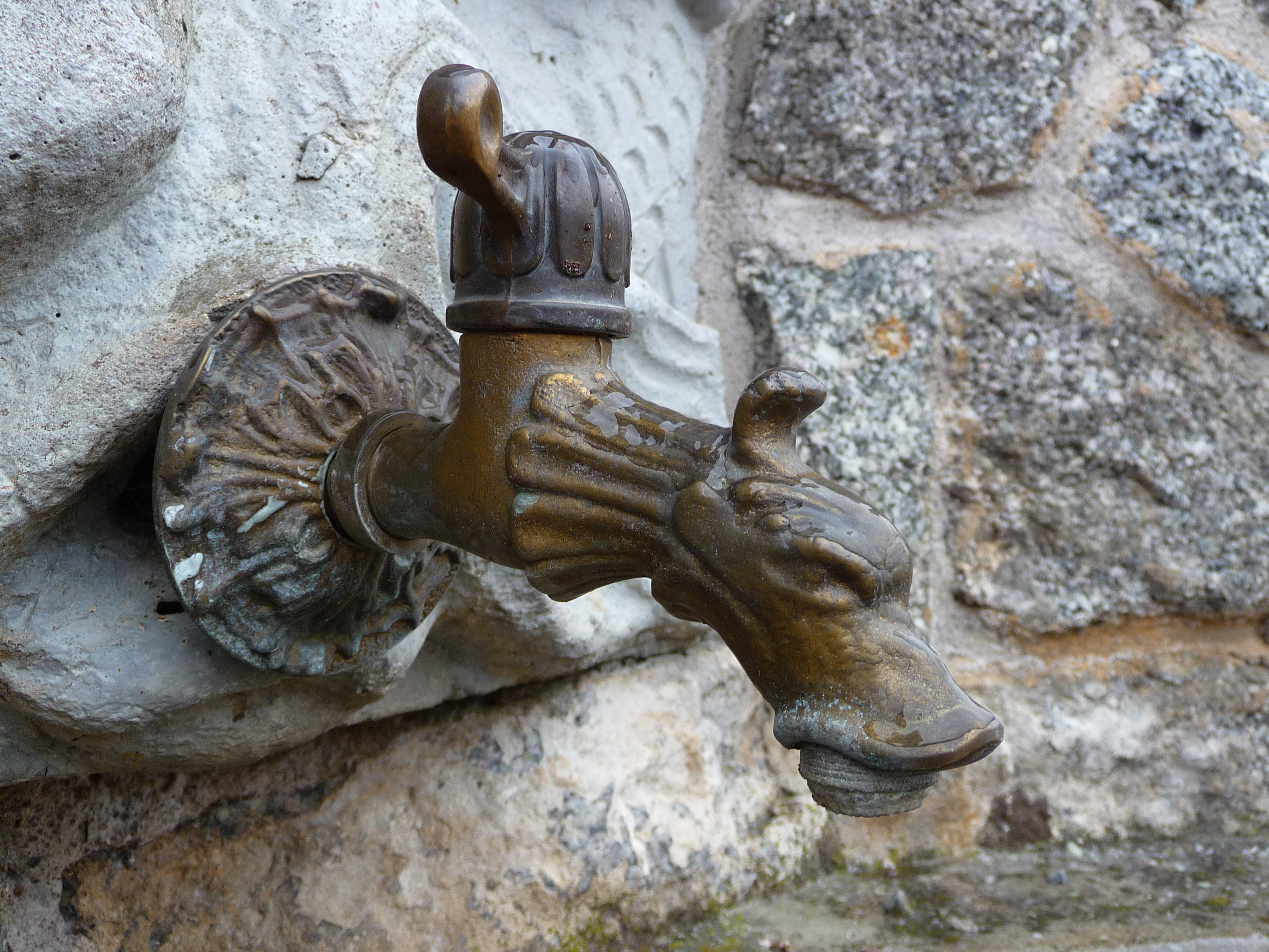 Hahn aus Messing an einem Friedhofsbrunnen (in Form eines Entenkopfs)